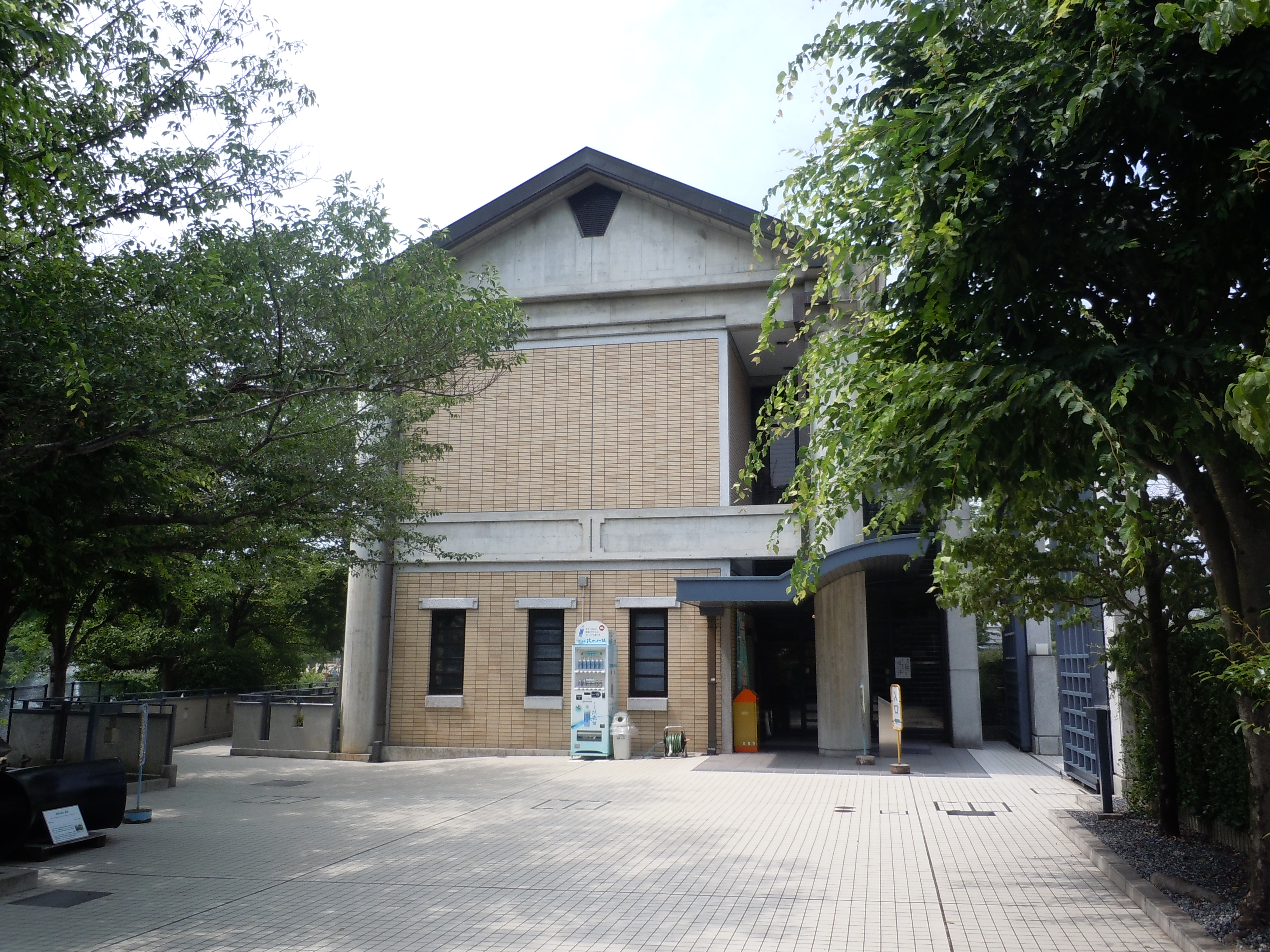 琵琶湖疎水記念館。